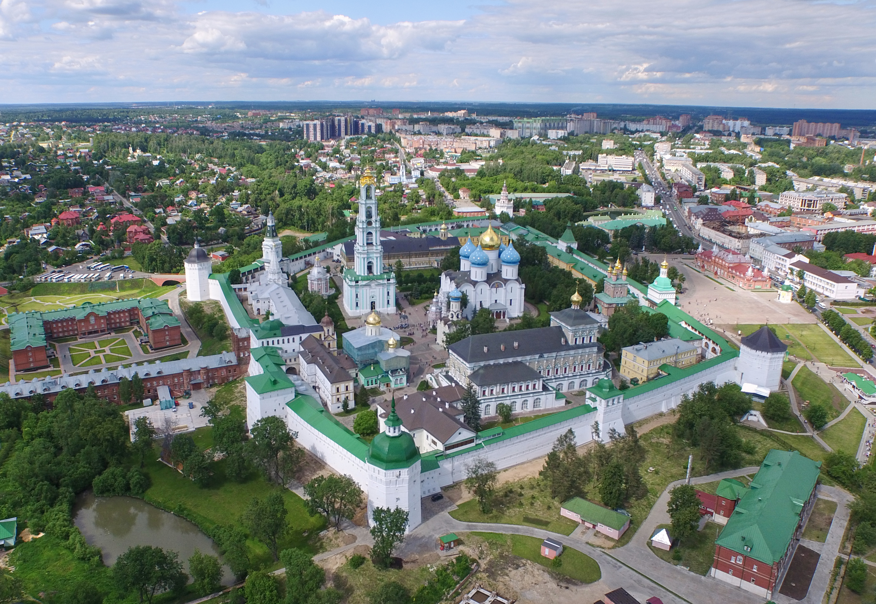 Lavra, aerial view 4 / Sergiyev Posad, Russia